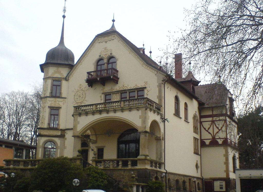 Villa Muttersegen, Goetheallee 24, Dresden-Blasewitz